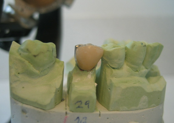 dental imprint